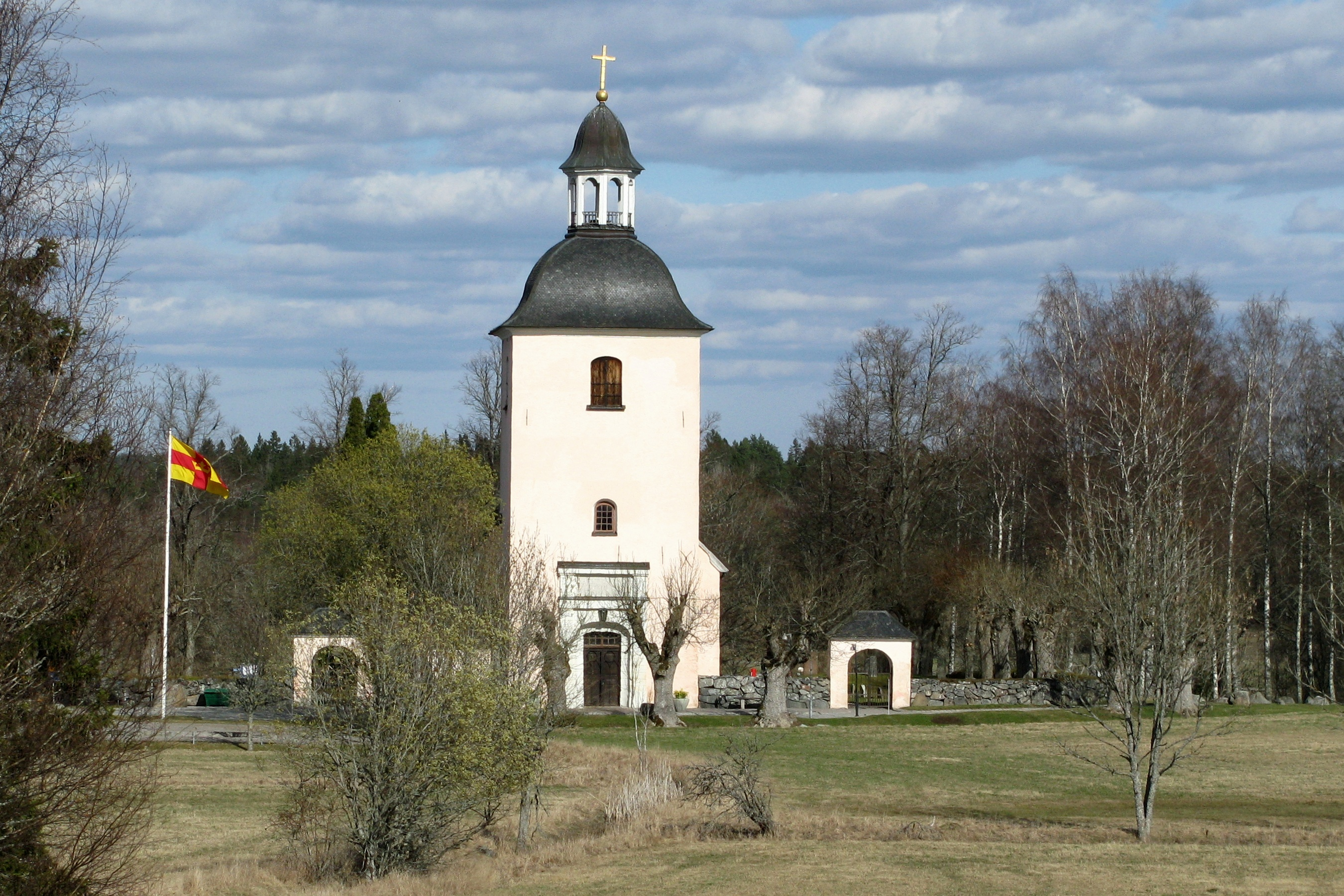 Västra Ryds kyrka i Uppland.